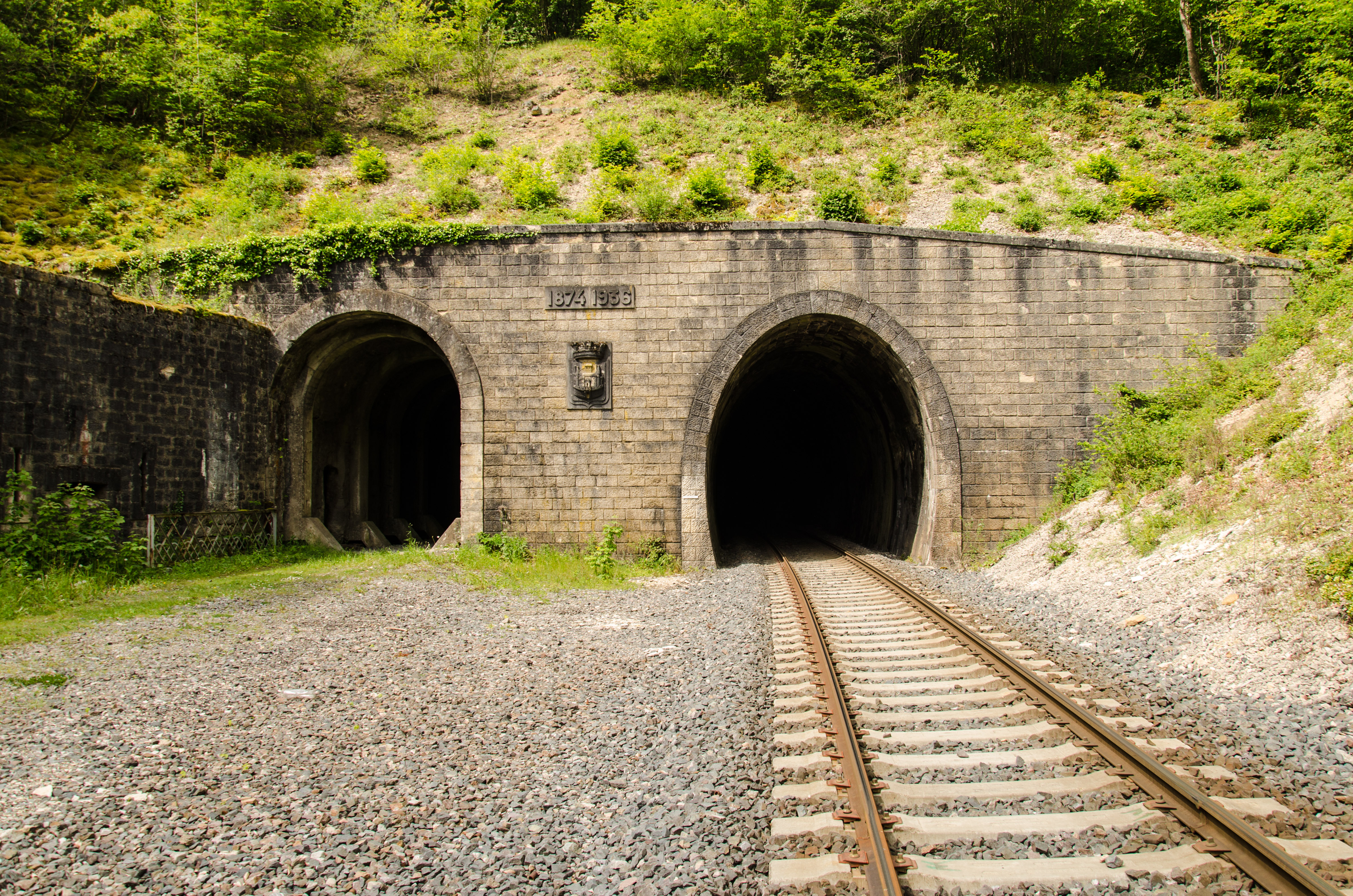 L'ancienne galerie, à gauche, n'est plus utilisée. La plus récente voit encore passer des lignes régulières au diesel